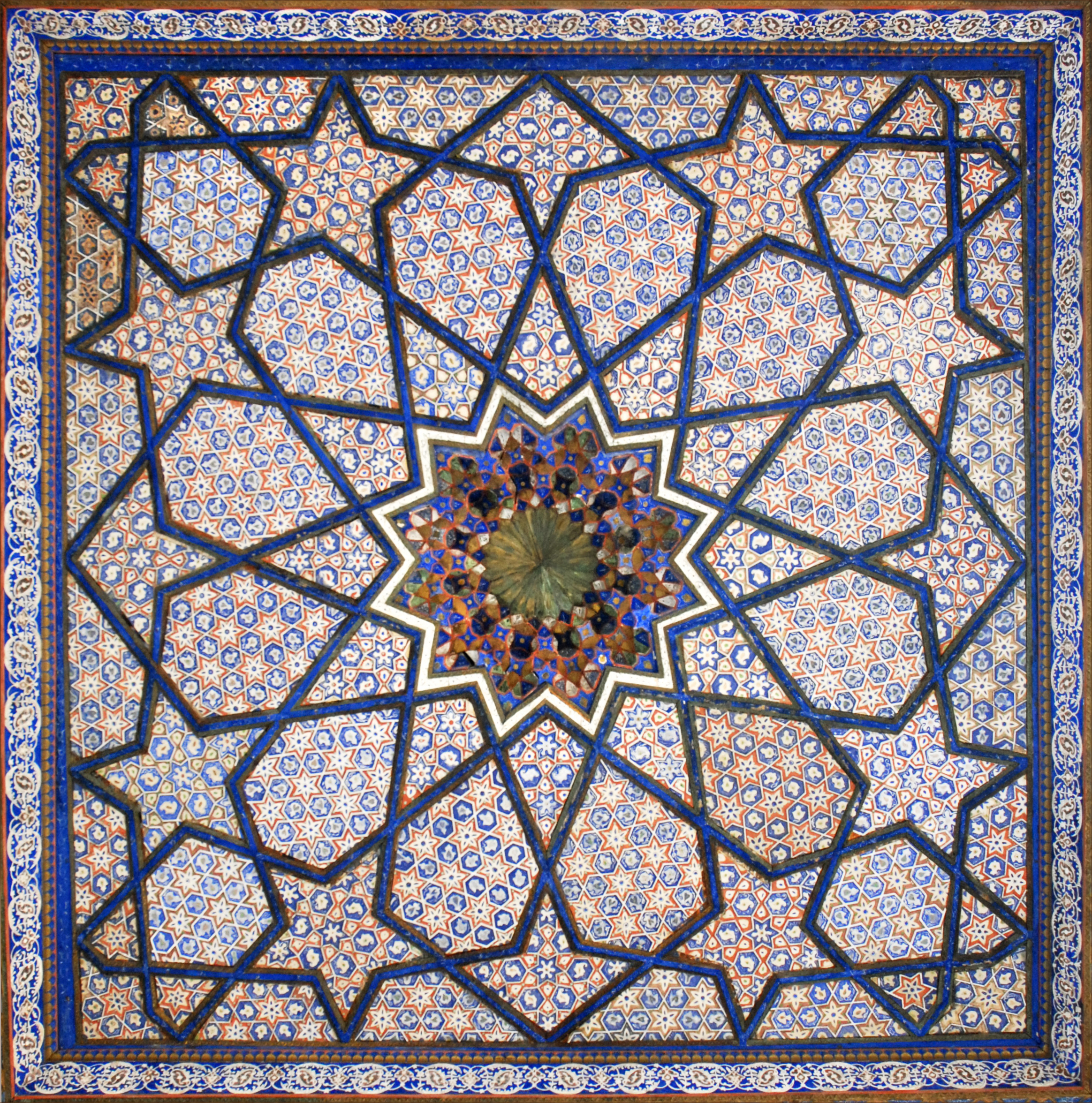 La médersa Nadir-Divanbeg et une mosquée d'été dont on voit le décor d'un plafond, ont été construites, à Samarcande, autour du mausolée de Khodja Akhrar, un soufi de la secte des Naqchbandi, mort en 1490 à Kamongaron. Khodja Akhrar est considéré comme un saint homme et vénéré avec ferveur.